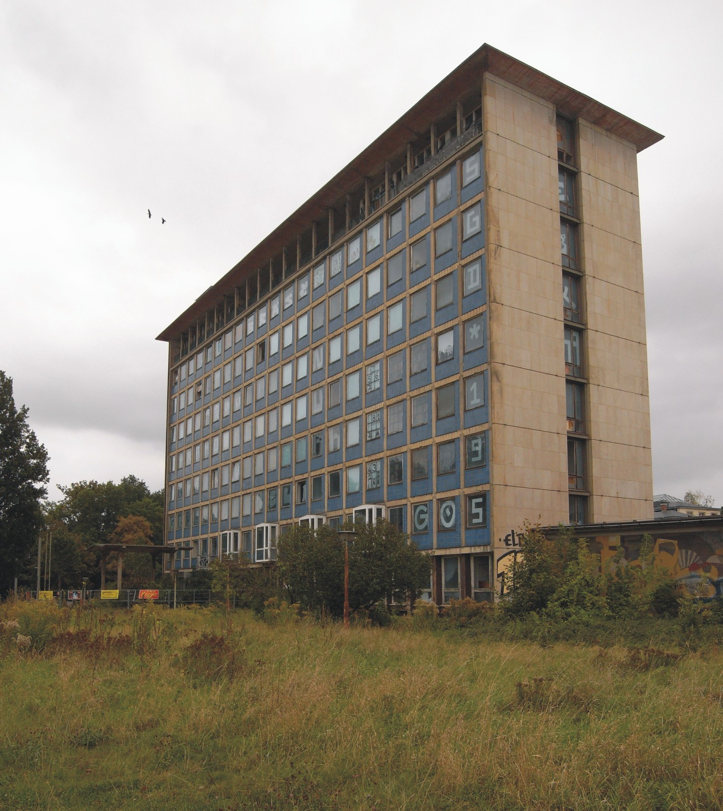 Gebäude des ehemaligen Zentralen Forschungsinstituts für Arbeit Dresden (Sachsen, Deutschland)